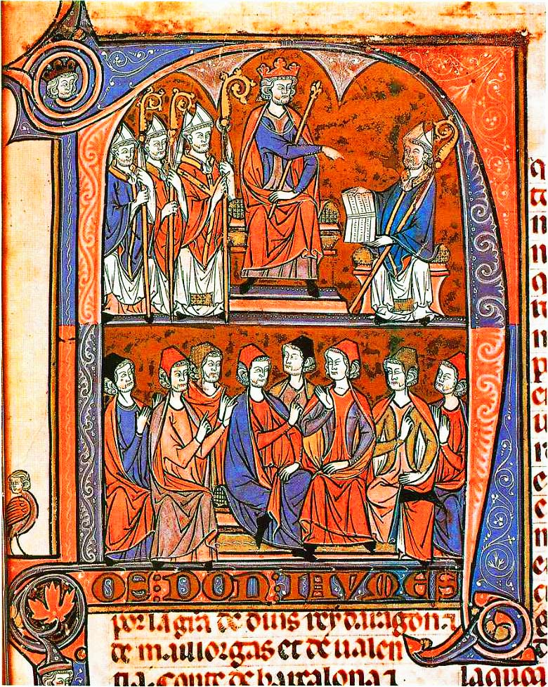 Vidal mayor. Incipit. (Primera compil·lació dels Furs d'Aragó realitzada pel bisbe català d'Osca Vidal de Canyelles el 1247). Jaume I d'Aragó rep del bisbe i jurista Vidal de Canyelles la compil·lació dels Furs d'Aragó davant d'altres eclesiàstics. En el plà inferior d'altres ricshomens i magnats de la cúria reial. Íncipit: Nos, don Iavmes, por la g[rat]ia de Dius rey d'Aragon et de Maillorgas et de Valencia, conte de Barçalona et [de Urgel et seynor de Montpesler, acabadas las gananncias de la nuestra conquista et todo quoanto daquendes de la mar oriental las encontradas de la nuestra acquisición contienen]